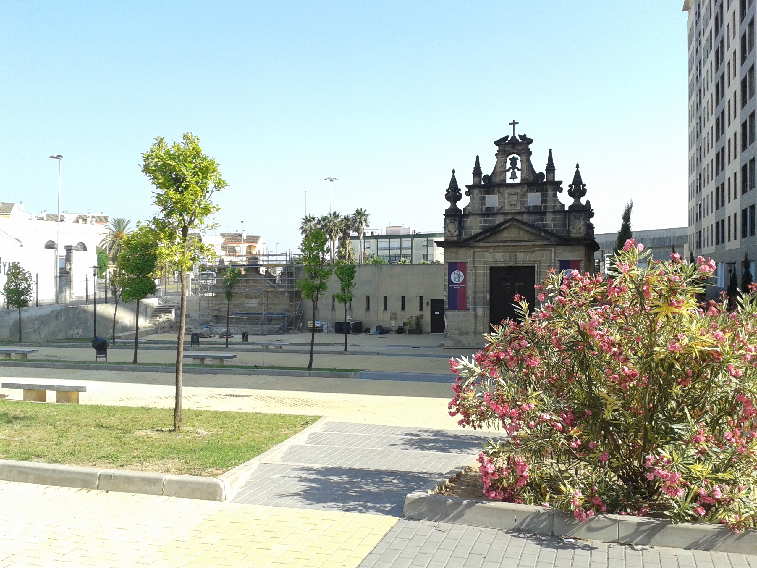 ermita de Guía y Fuente de La Alcubilla en obras. Jerez